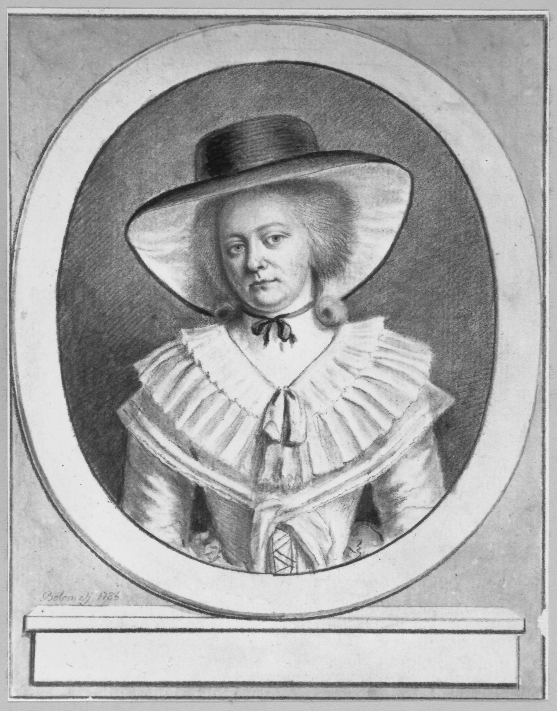 Susanna Bloteling, begraven te Den Haag in de Grote Kerk op 26 mei 1803, was de echtgenote (Den Haag, Hoogduitse Kerk, 3 april 1774) van nationaal archivarus Hendrik van Wijn (1740-1831). Eerder was zij gehuwd geweest te Brielle in 1775 met Nicolaas Adriaan Copius.